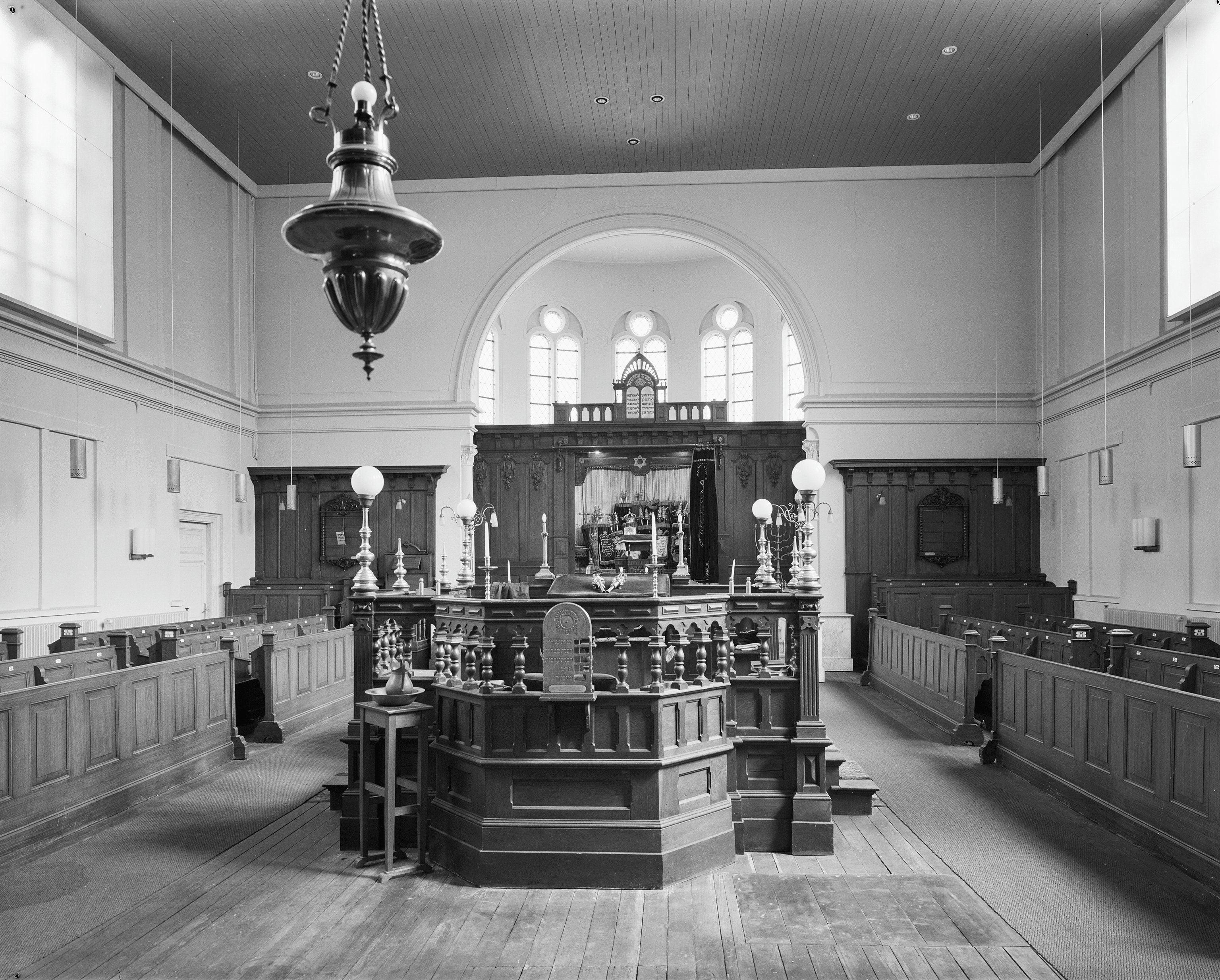 Synagoge: Interieur van de synagoge te Zwolle met biema (= verhoging voor het voorlezen van de Tora) en Heilige Arke